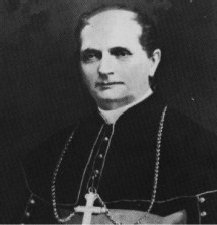 Bischof Peter Joseph Baltes, Ensheim, Saar, Deutschland, Alton Illinois